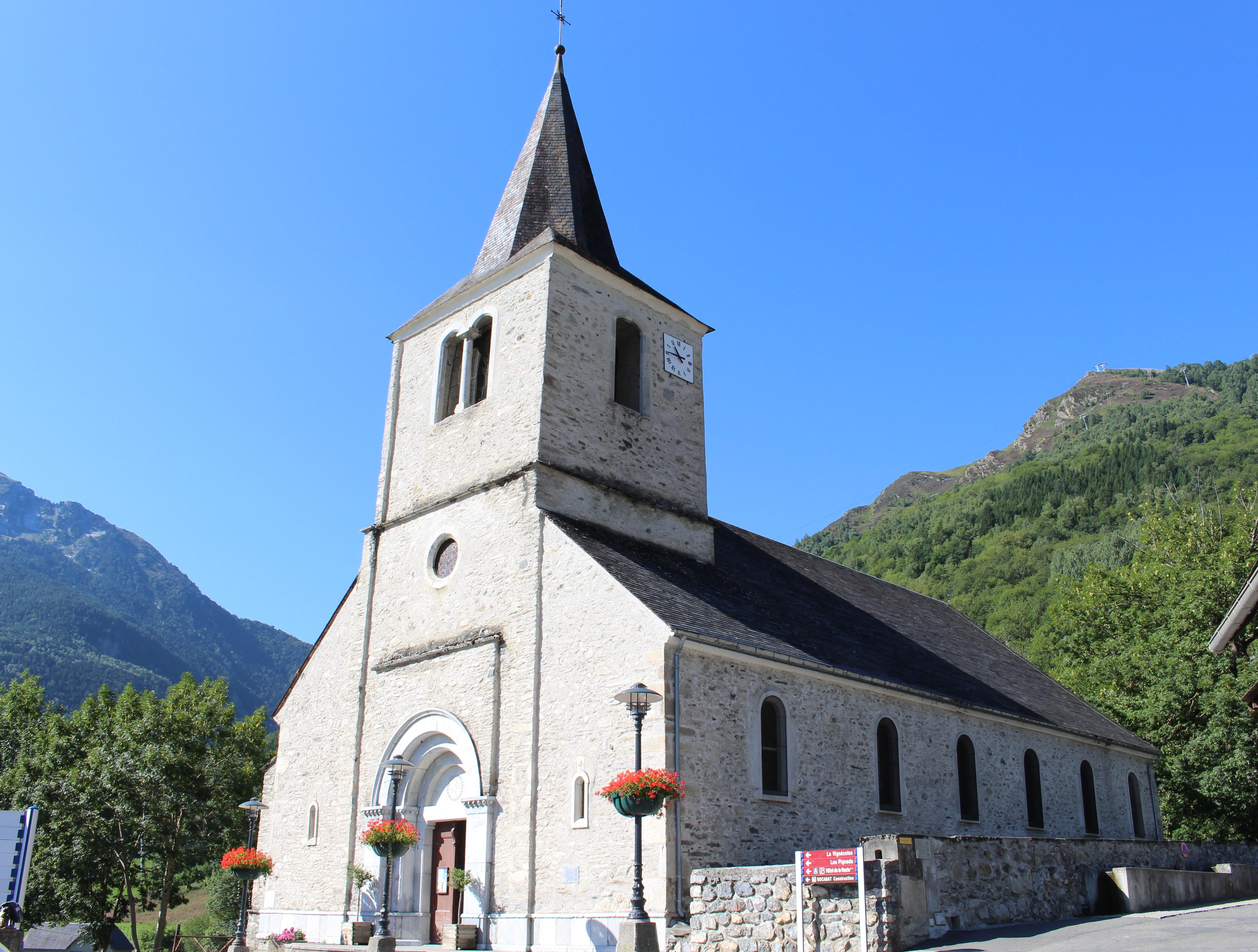 Église Saint-Jacques de Vignec (Hautes-Pyrénées)